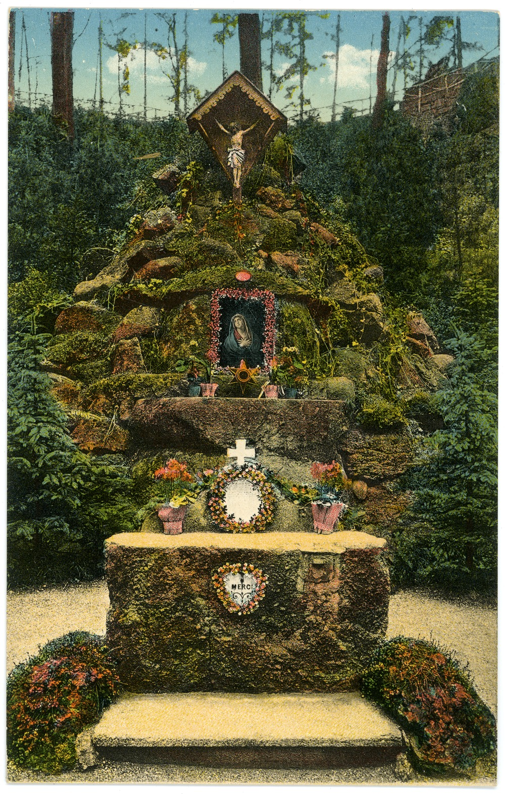 Karlsbad; Waldandacht am Jägerhaus This postcard is from publisher Brück & Sohn in Meißen ( This postcard has a unique number 15444 and is available in a higher resolution at the publisher. This images was uploaded in a cooperation project between Wikipedians and the publisher.